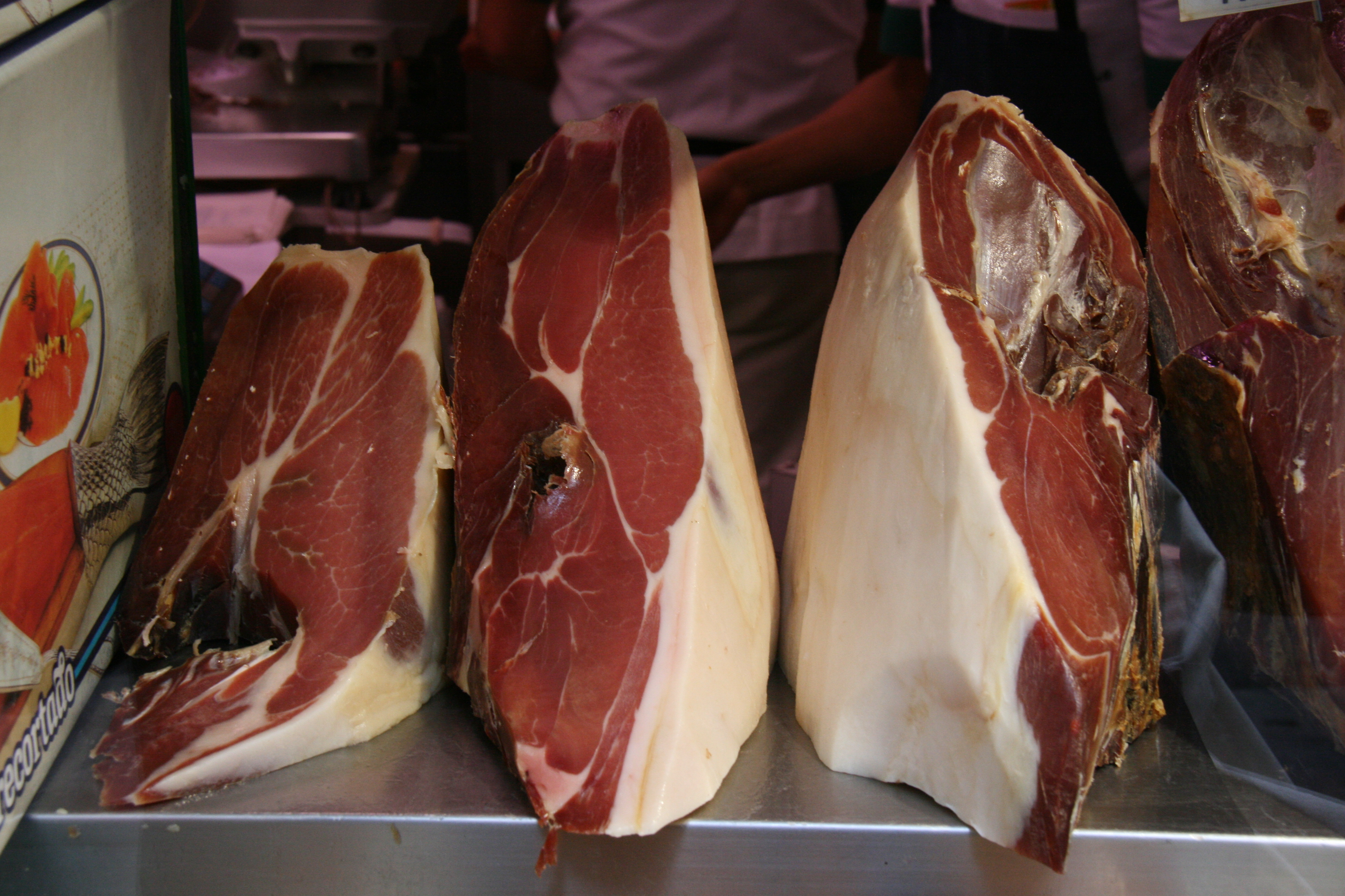 jamón deshuesado